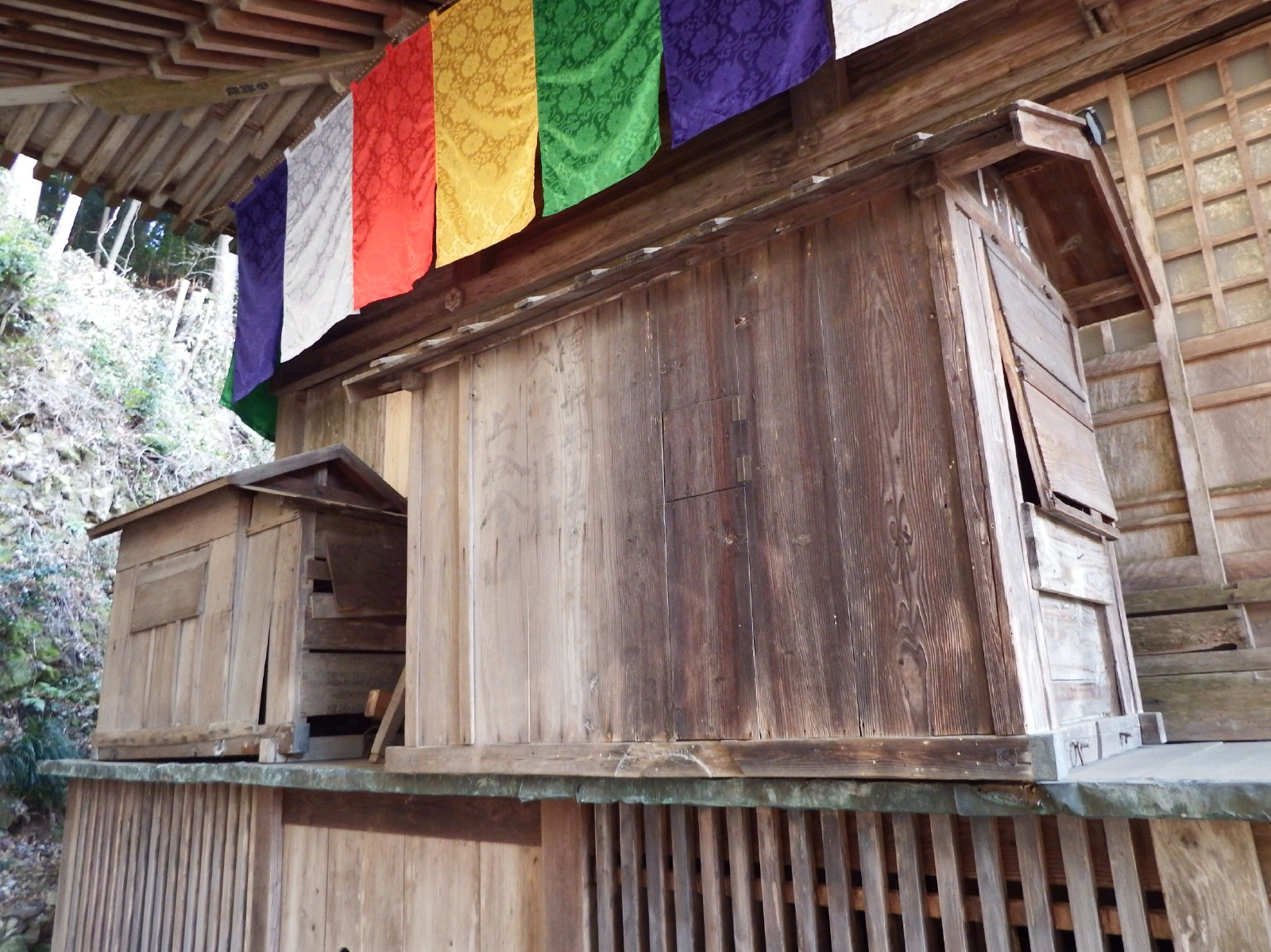 平等寺本堂に置かれている。